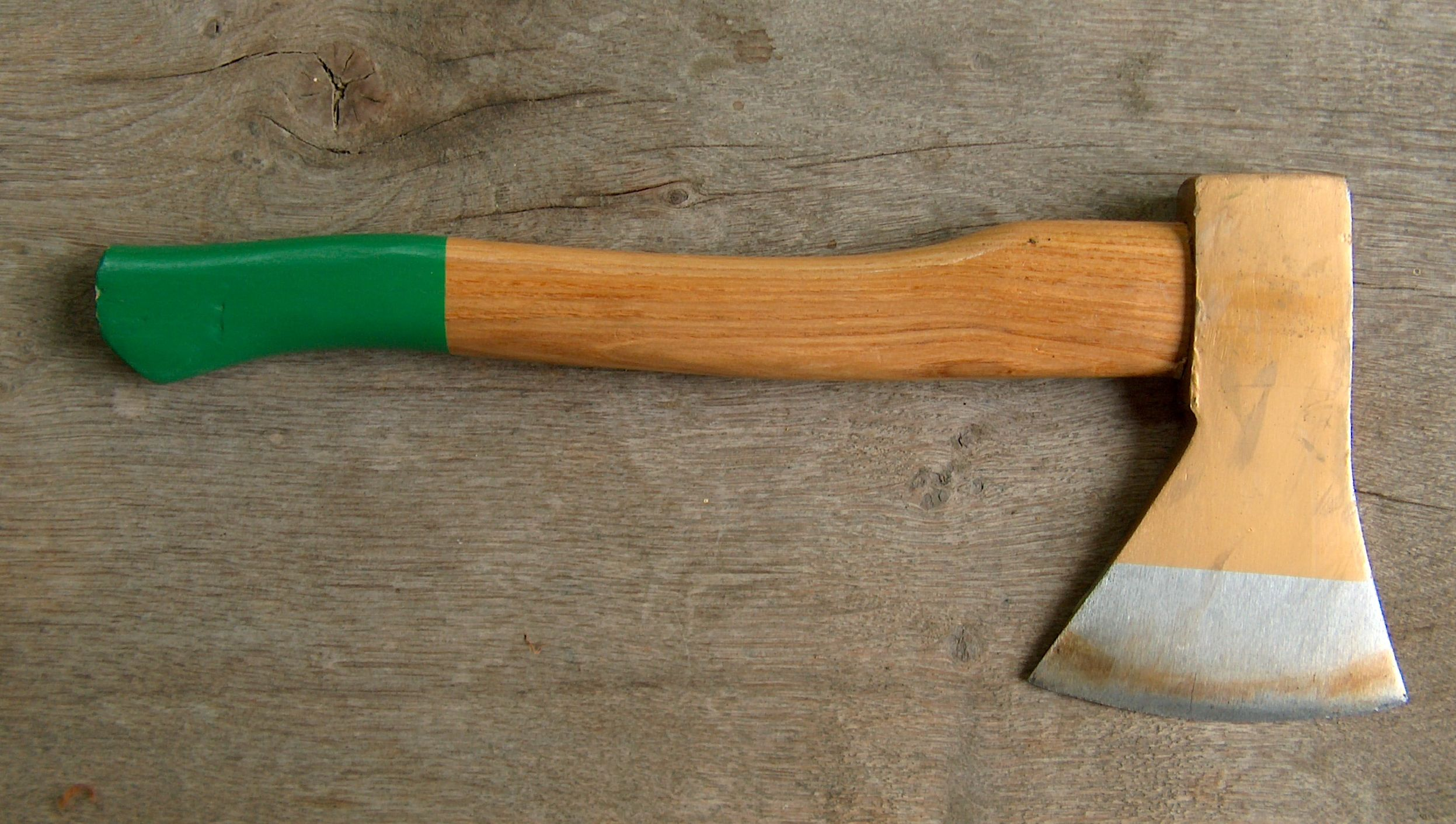 Handbeil 800g